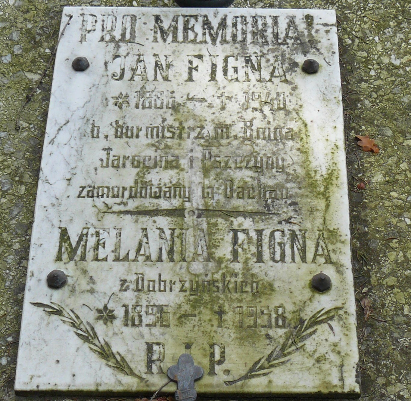 Grób Jana Figny - burmistrza Bnina, Jarocina i Pszczyny. Cm. w Sobocie.